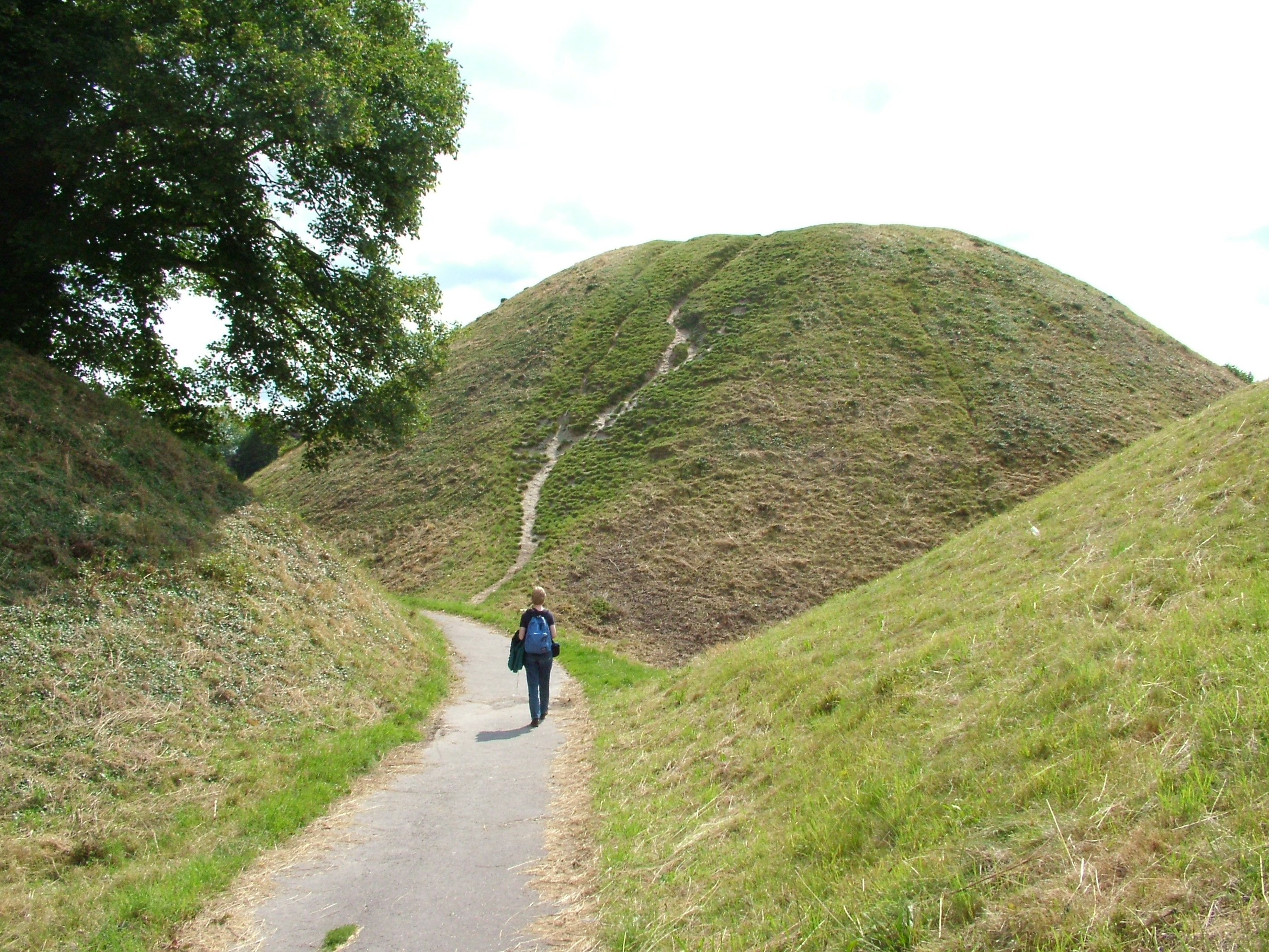 Thetford (Norfolk), Norman motte